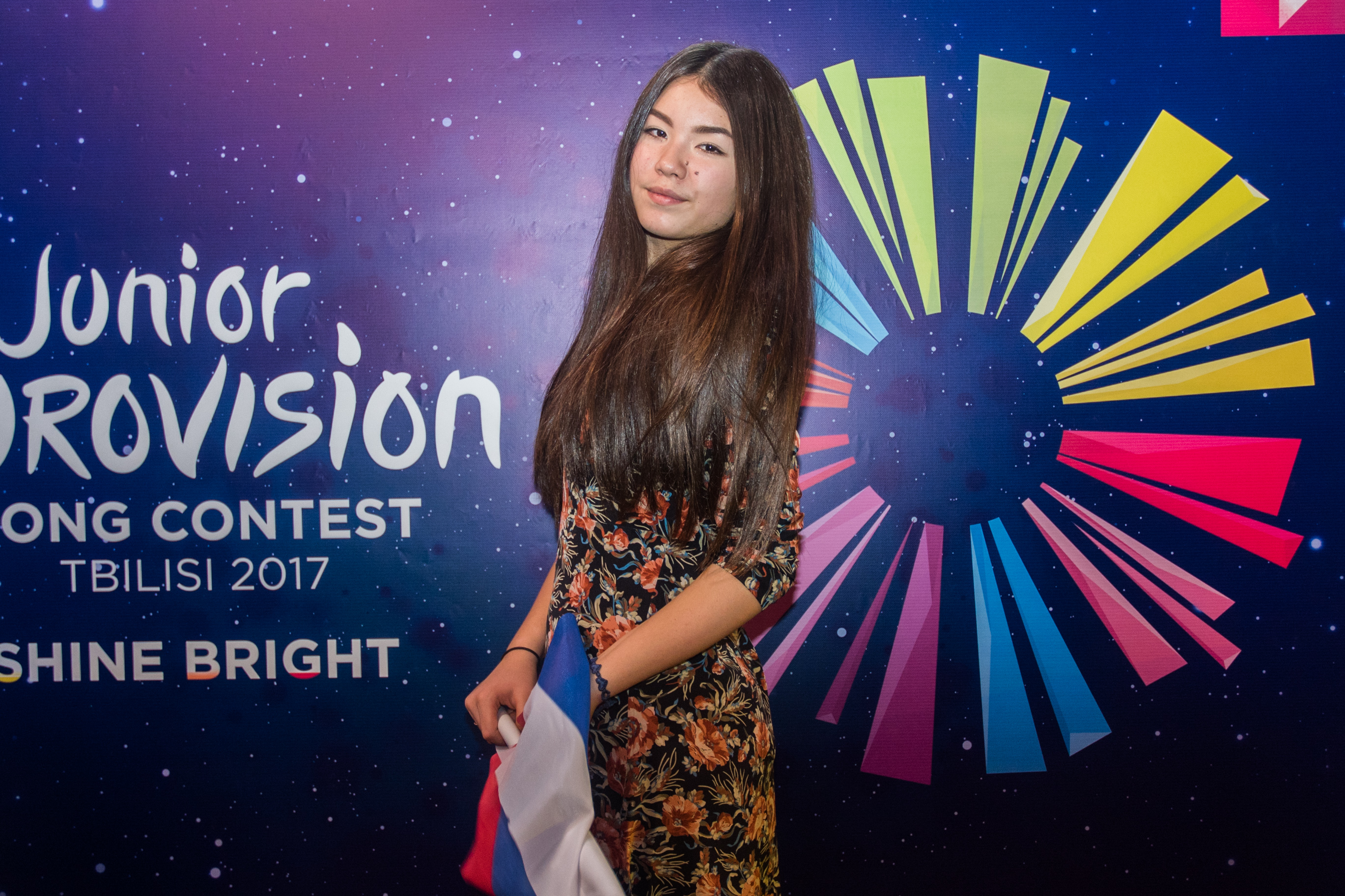 Полина Богусевич на церемонии открытия Детского Евровидения 2017